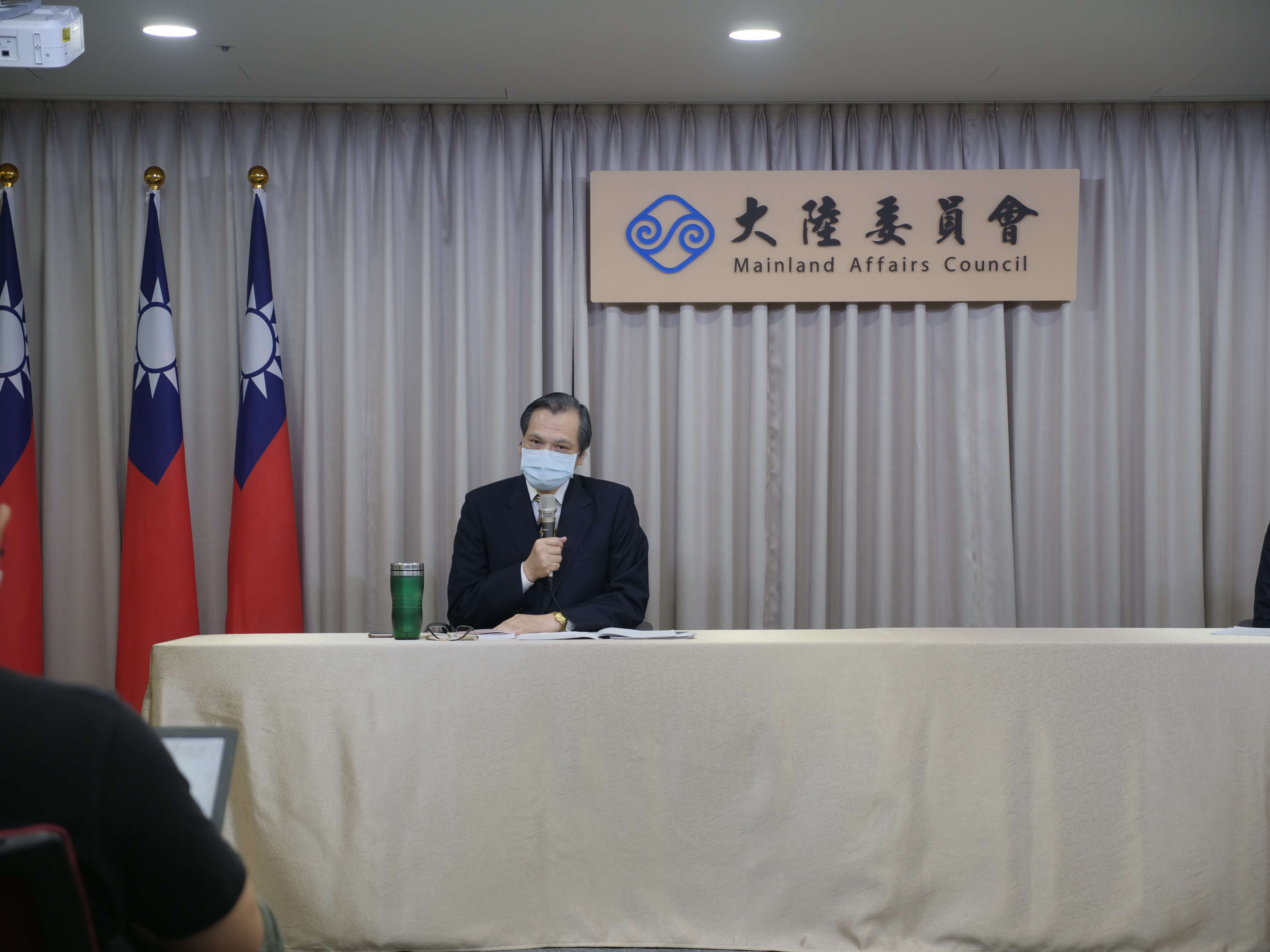 台灣啟動對香港抗爭者的援助，陸委會主委陳明通6月18日召開記者會，公佈香港人道援助關懷行動專案